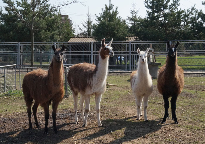 Груповий портрет: "Чотири лами Подільського зоопарку"